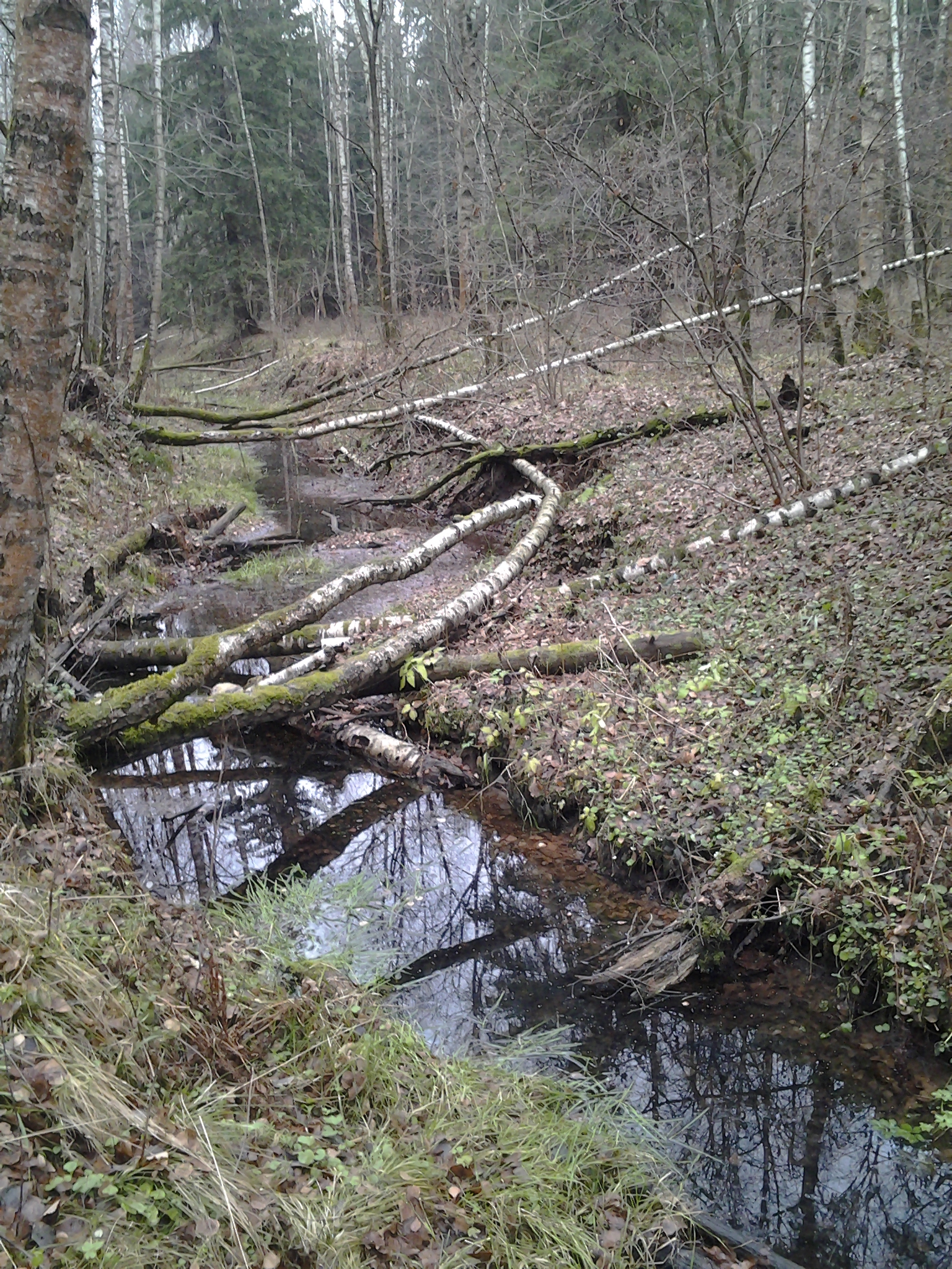 Берёзовые стволы образуют естественные мостики через Лось